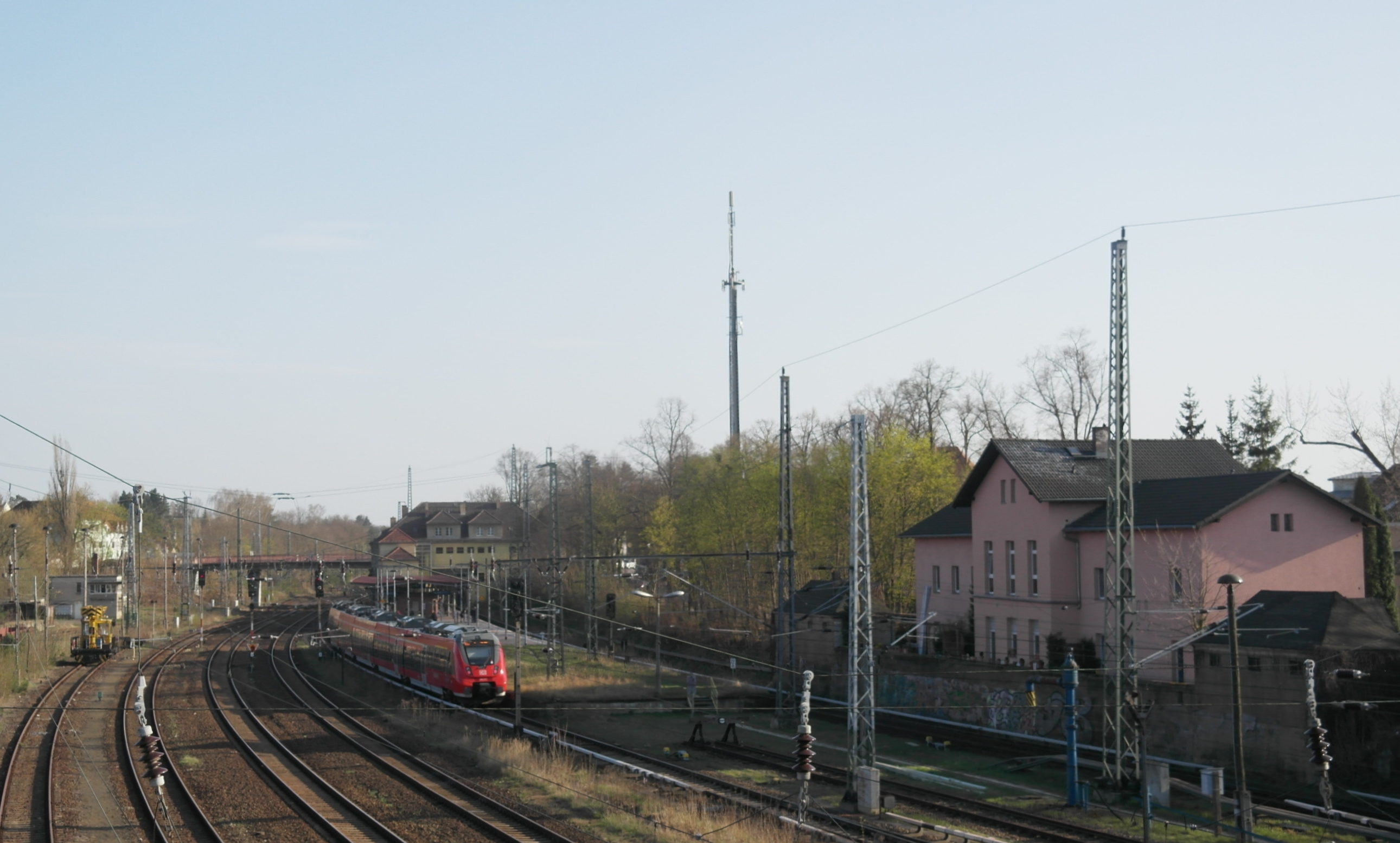 Bahnhof Birkenwerder, Blick von Norden